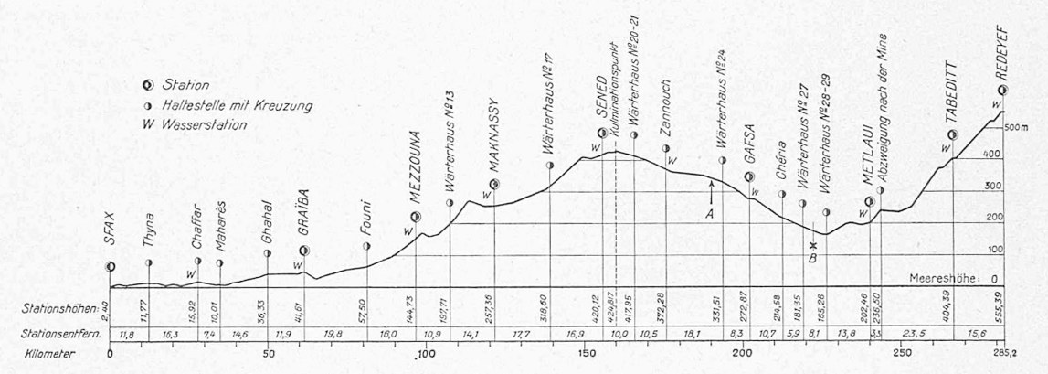 Längenprofil der Stammlinie der Gafsabahn in Tunesien